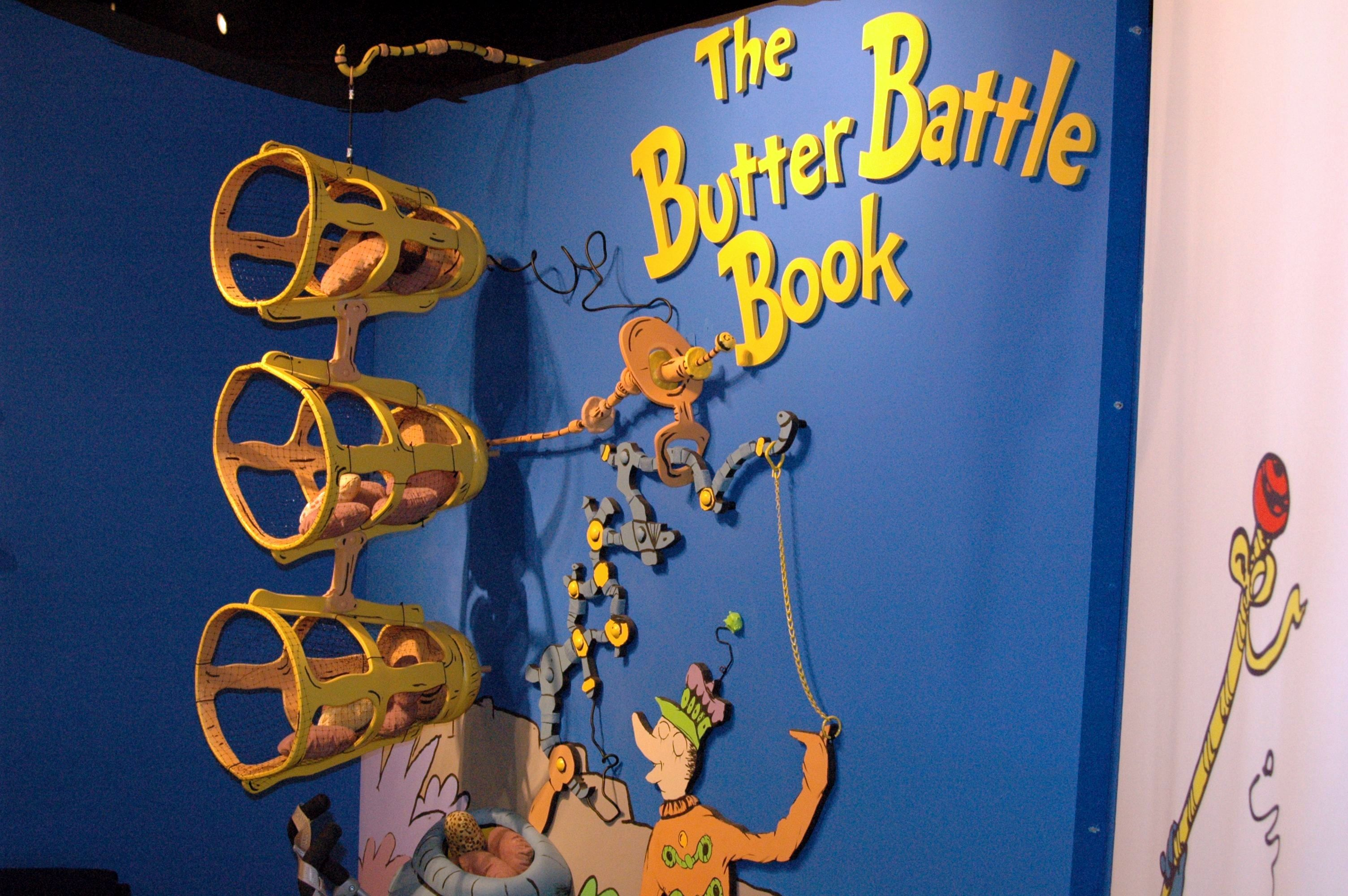 Suess Exhbit, Breman Jewish Museum, Atlanta